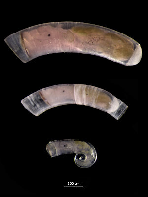 Caecum glabrum (Montagu, 1803)